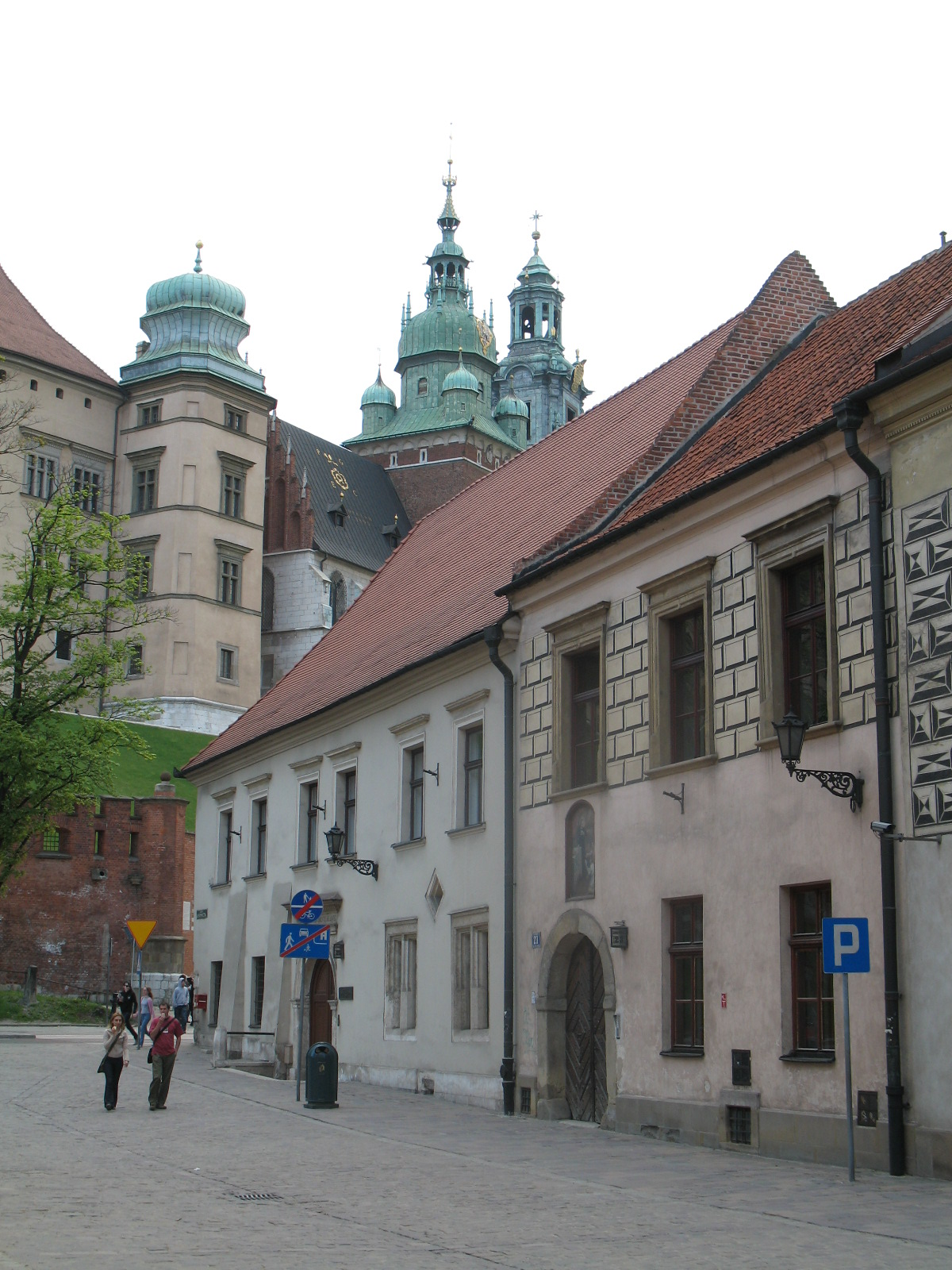 Ulica Kanonicza w Krakowie, Dom Długosza (nr 25, narożny) i nr 23 - tzw. "Lisia Jama"; Kanonicza Street in Kraków, The Długosz House (no. 25 on the corner) and no. 23